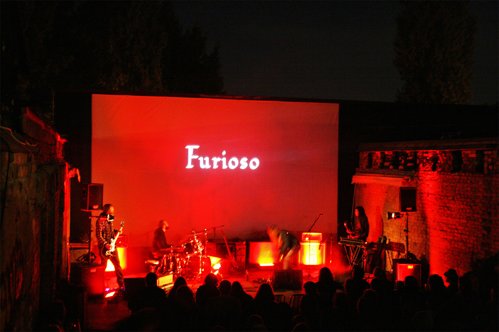 Freiluftkino Pompeji - Leinwand und Konzertbühne mit dem Filmkonzert: Samsara Blues Experiment play METROPOLIS - September 2011